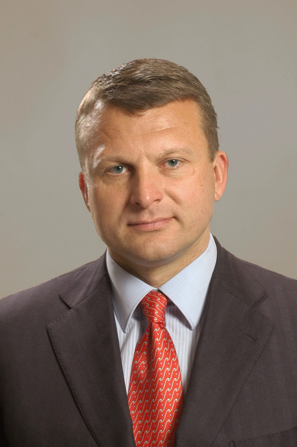 10.Saeimas deputāts Ainārs Šlesers